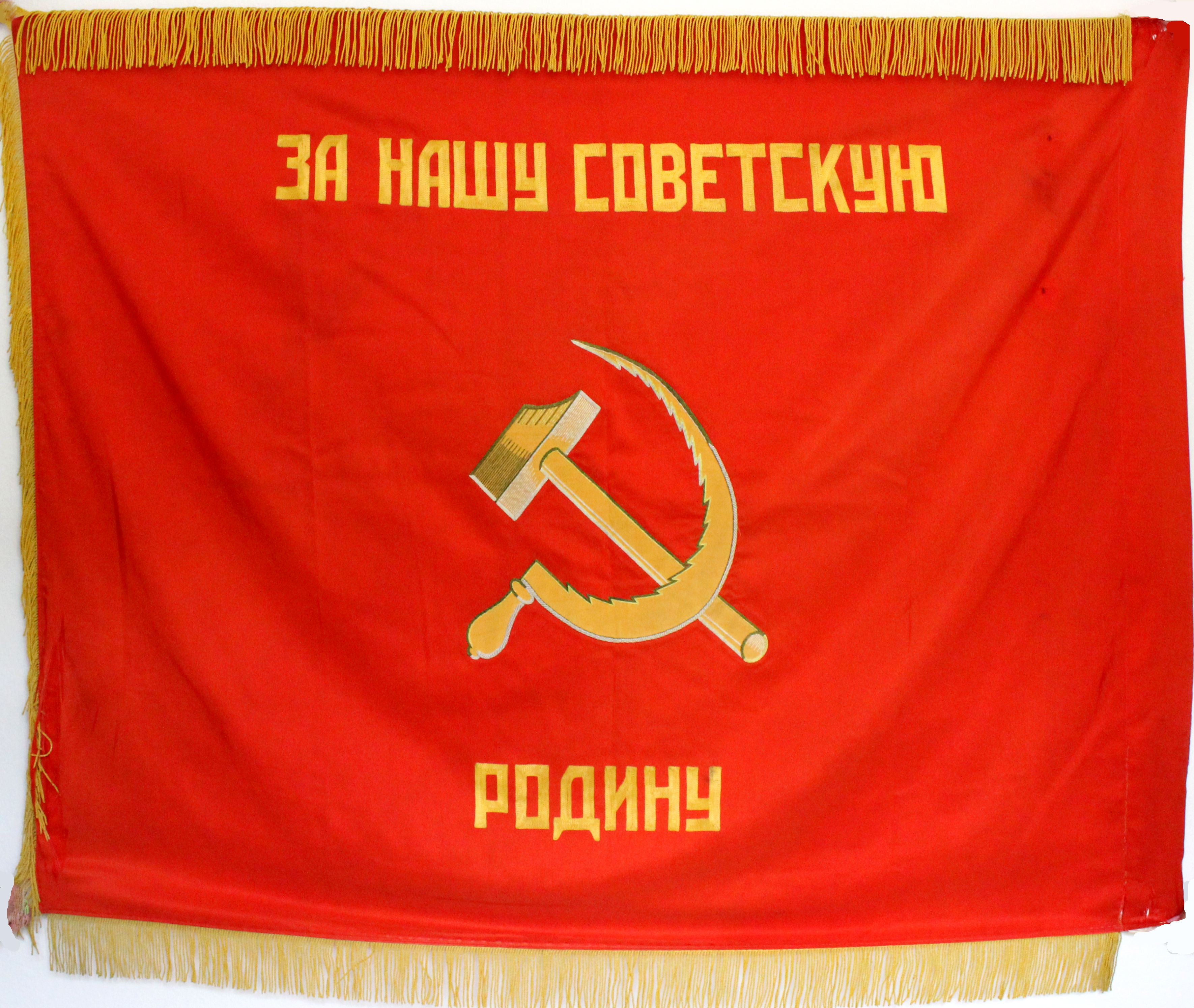 Знамя 87-го гвардейского артиллерийского полка. Реверс